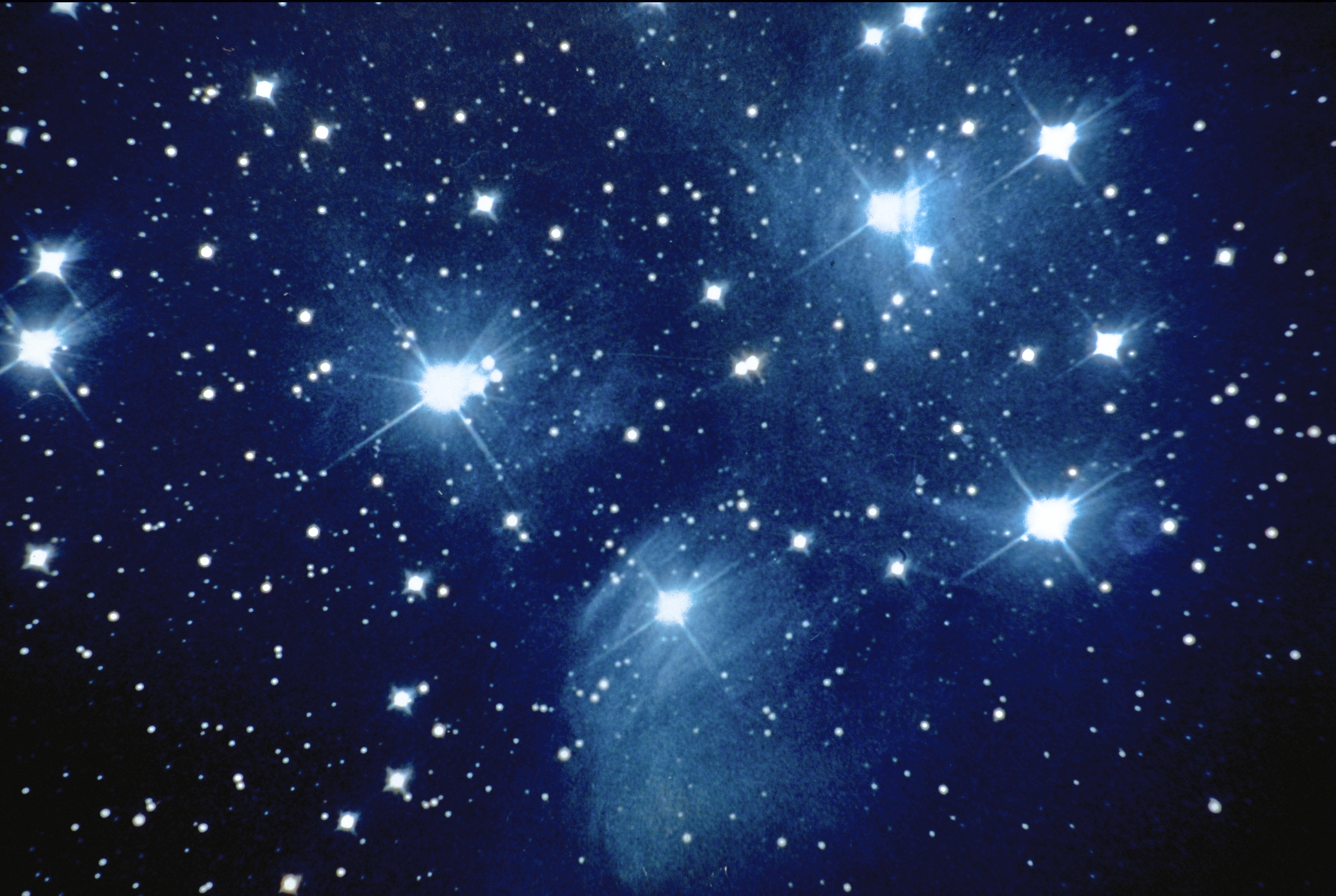 Die Plejaden fotografiert von Franz Haar